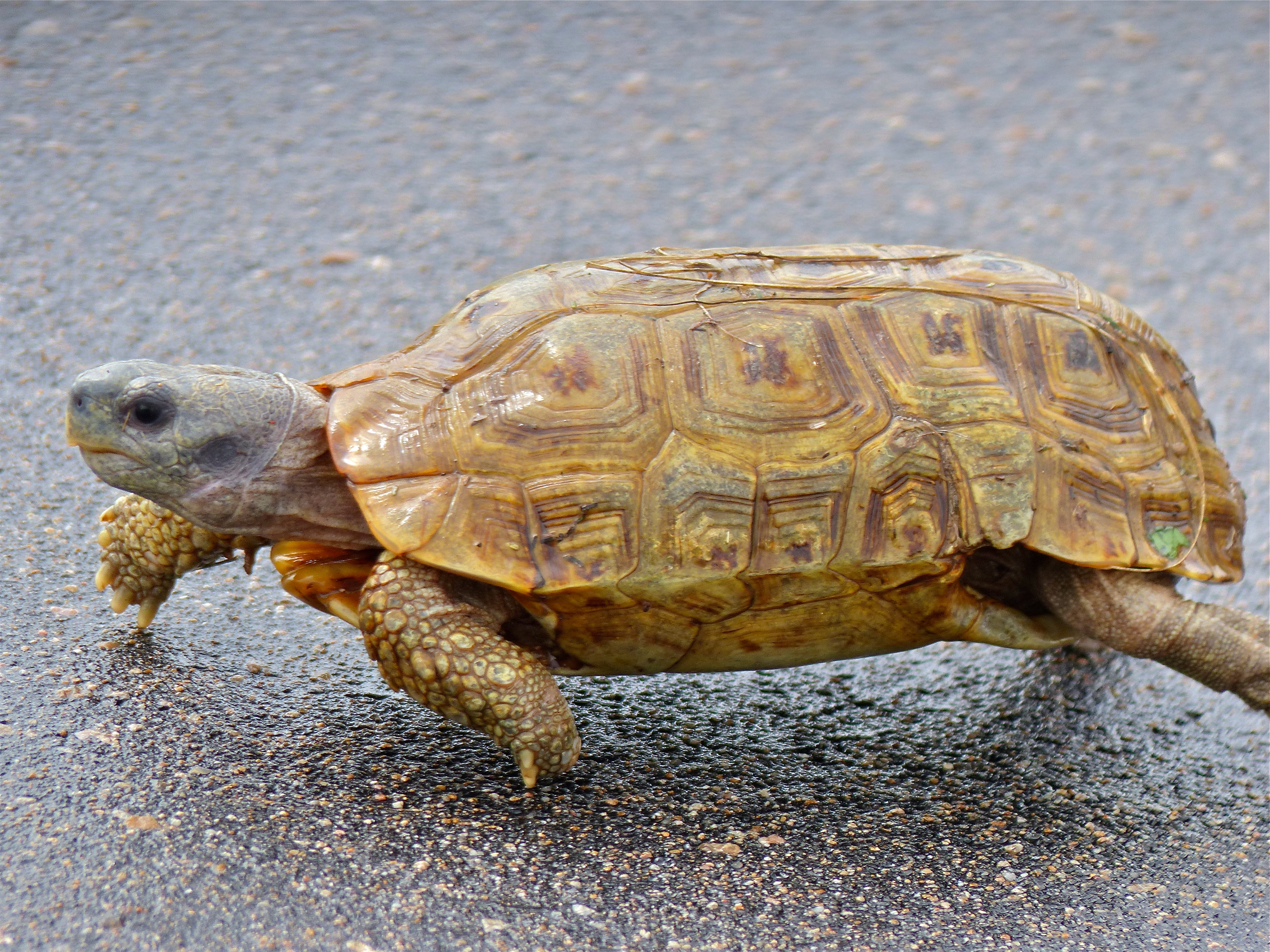 H4-1 Road East of Skukuza, Kruger NP, SOUTH AFRICA